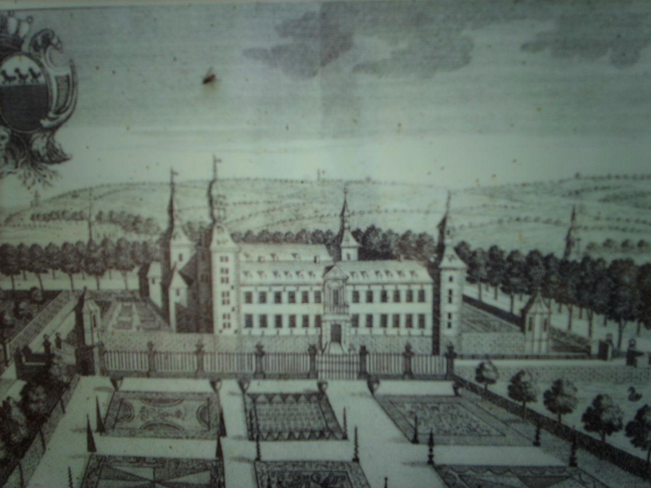 Kasteel van Betho circa 1743, tekening door R. Leloup